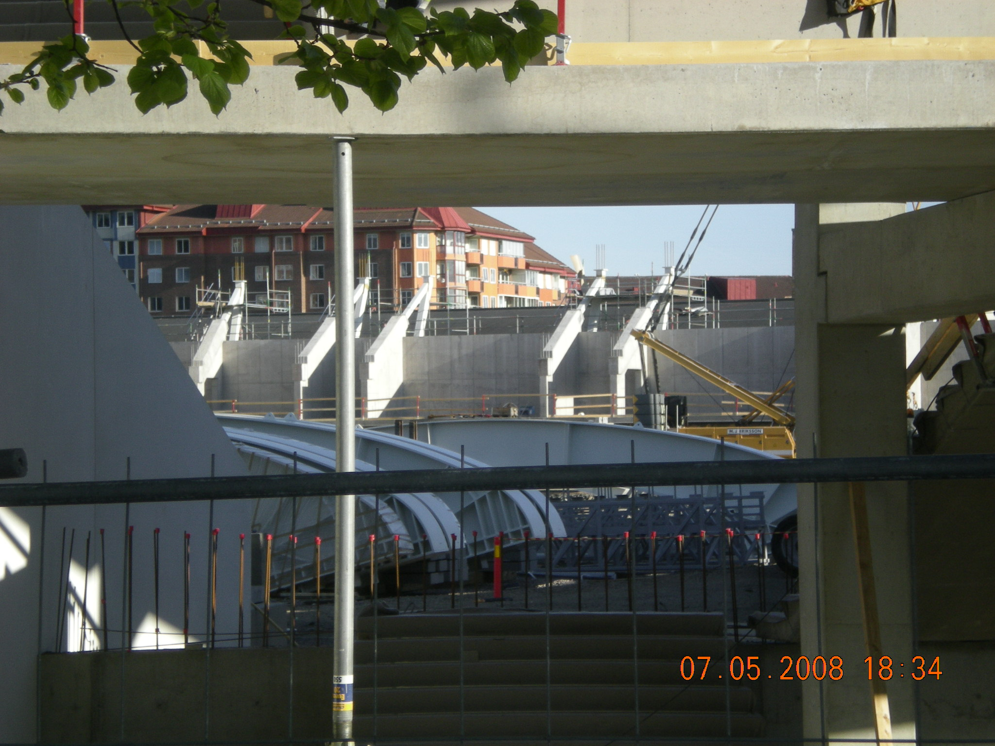 Nya-gamla Ullevi under ombyggnad